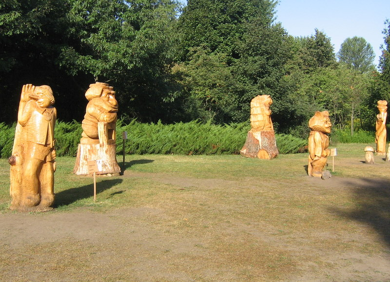 Парк Перемога в Черкасах